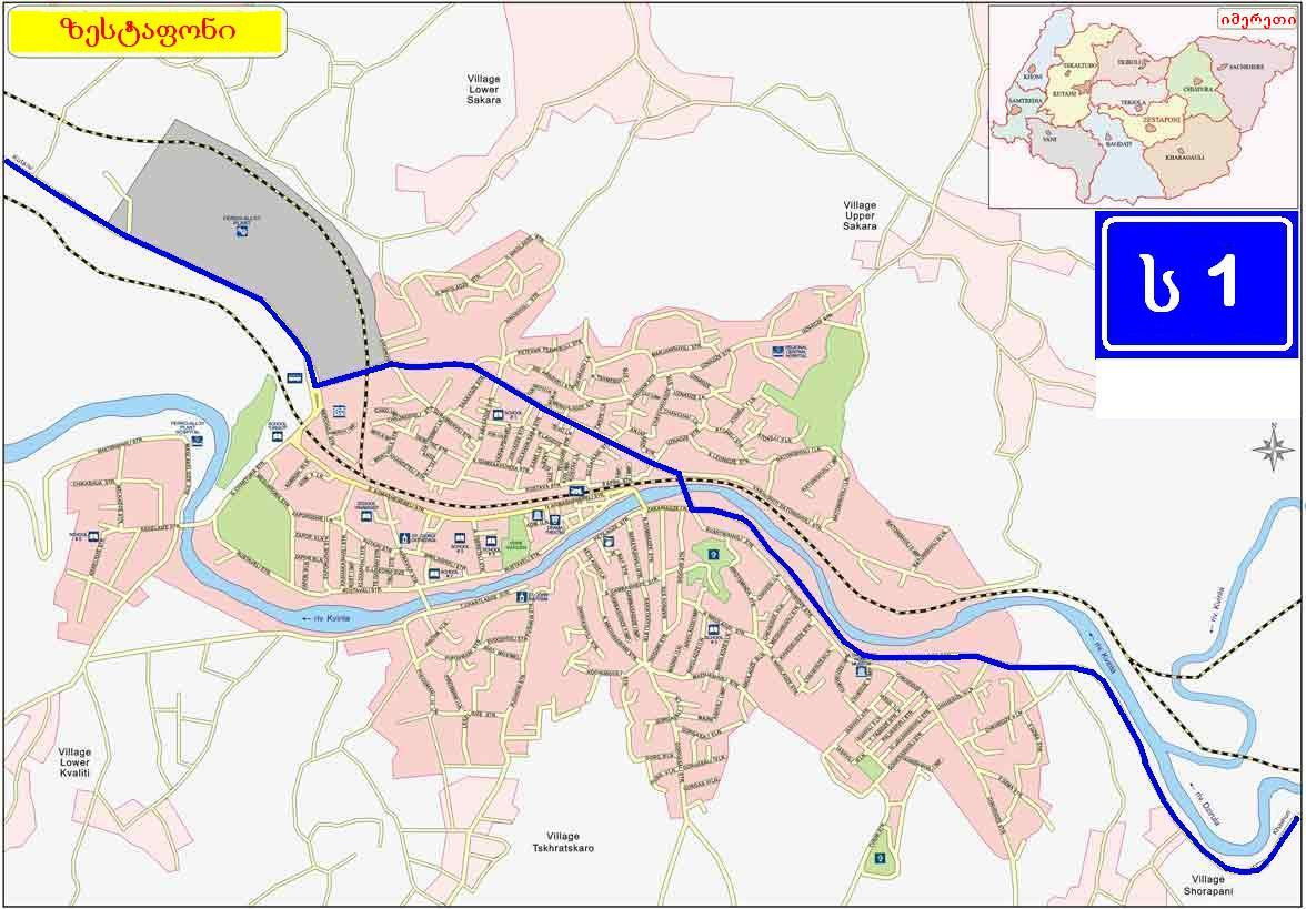 საქართველოს საავტომობილო მაგისტრალი ს1